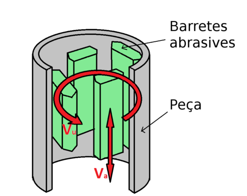 Esquema bruñido interiores